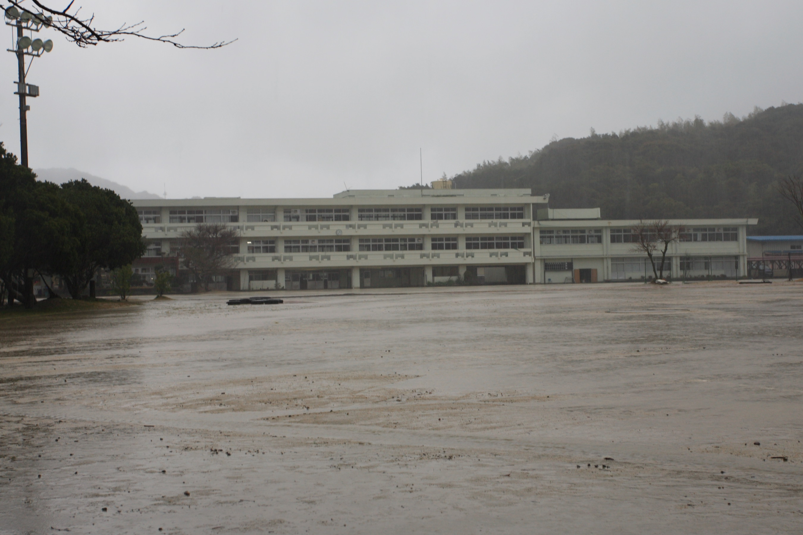 Shimizu middle school, Tosashimizu, Kochi, Japan.